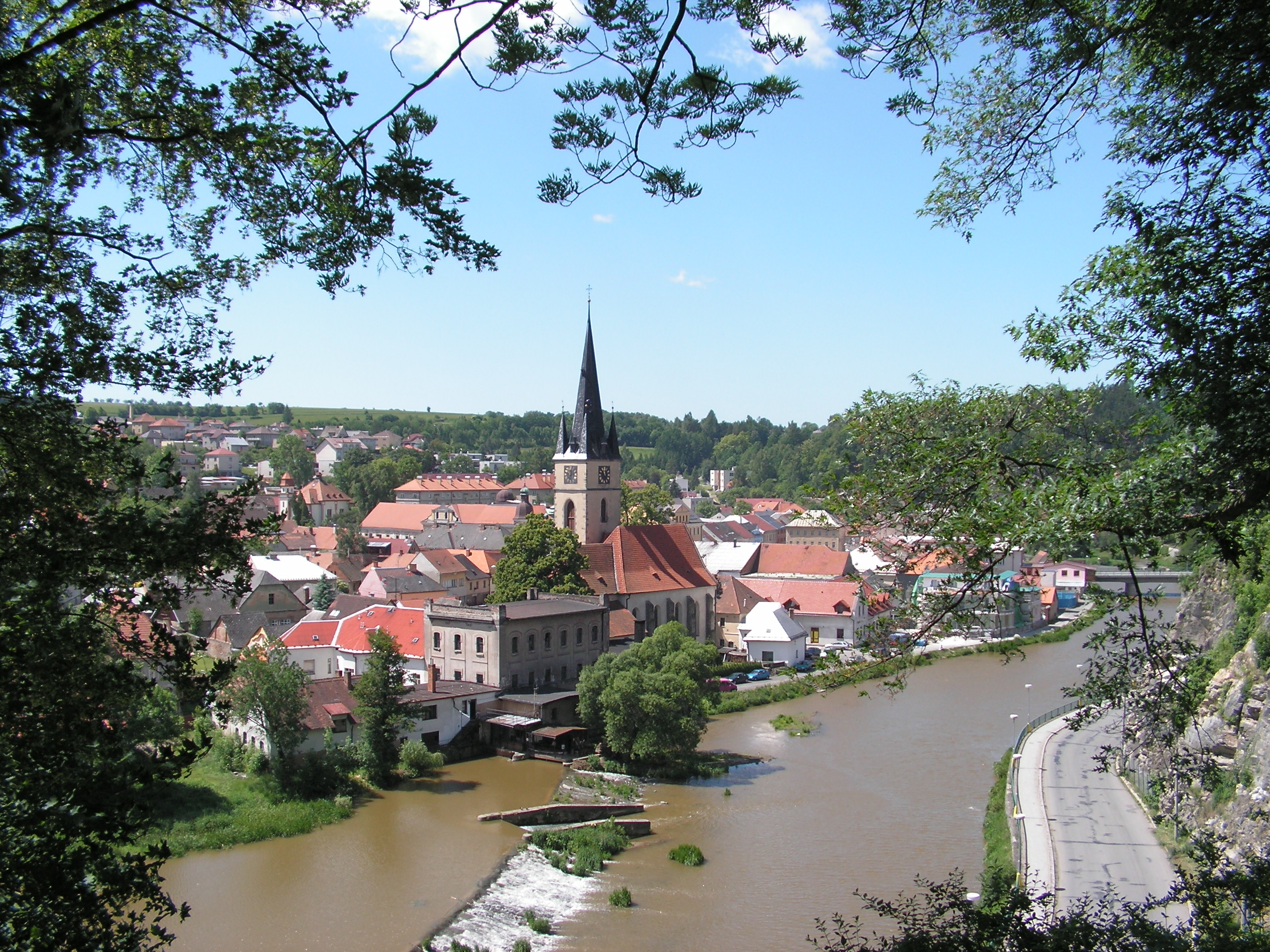 Město Ledeč nad Sázavou. Pohled z místa nad železniční zastávkou Horní Ledeč.